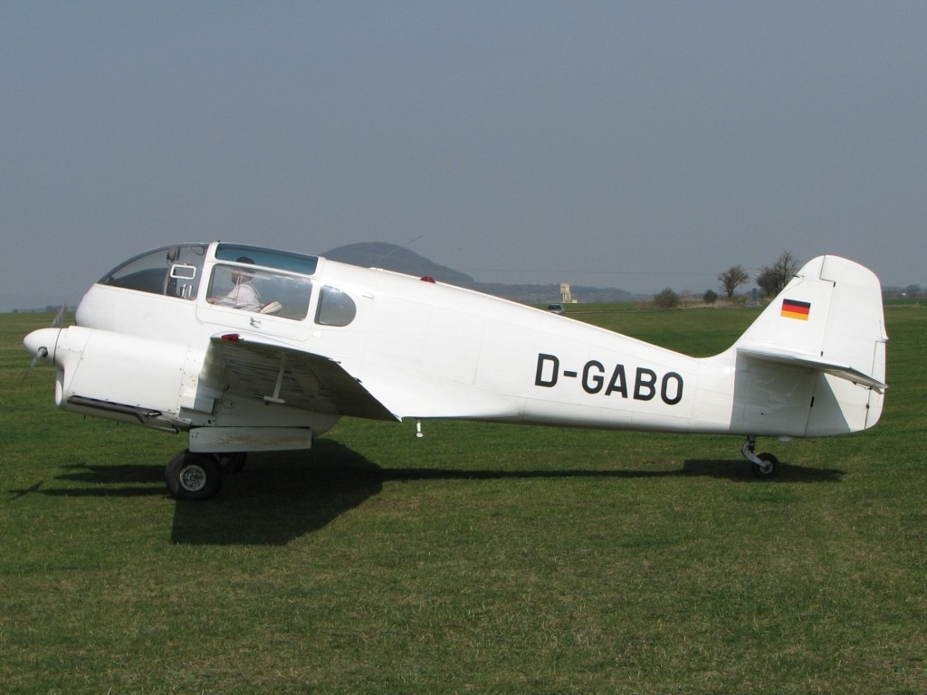 10.04. Majitel Dr.Hasko von Sanden